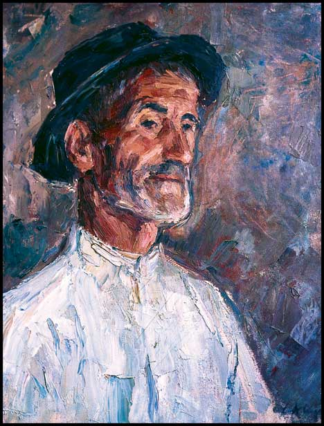 Le Père Androne, Cǎlin Alupi, 1972